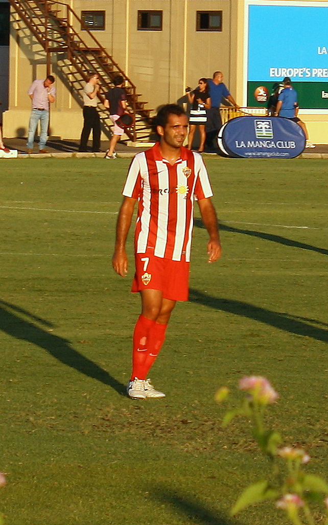 Fotografía de Verza, jugador de la U.D. Almería